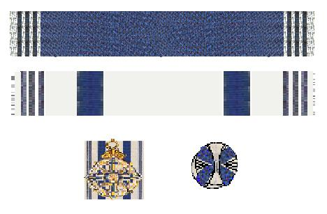 eig'n tek'nwerk